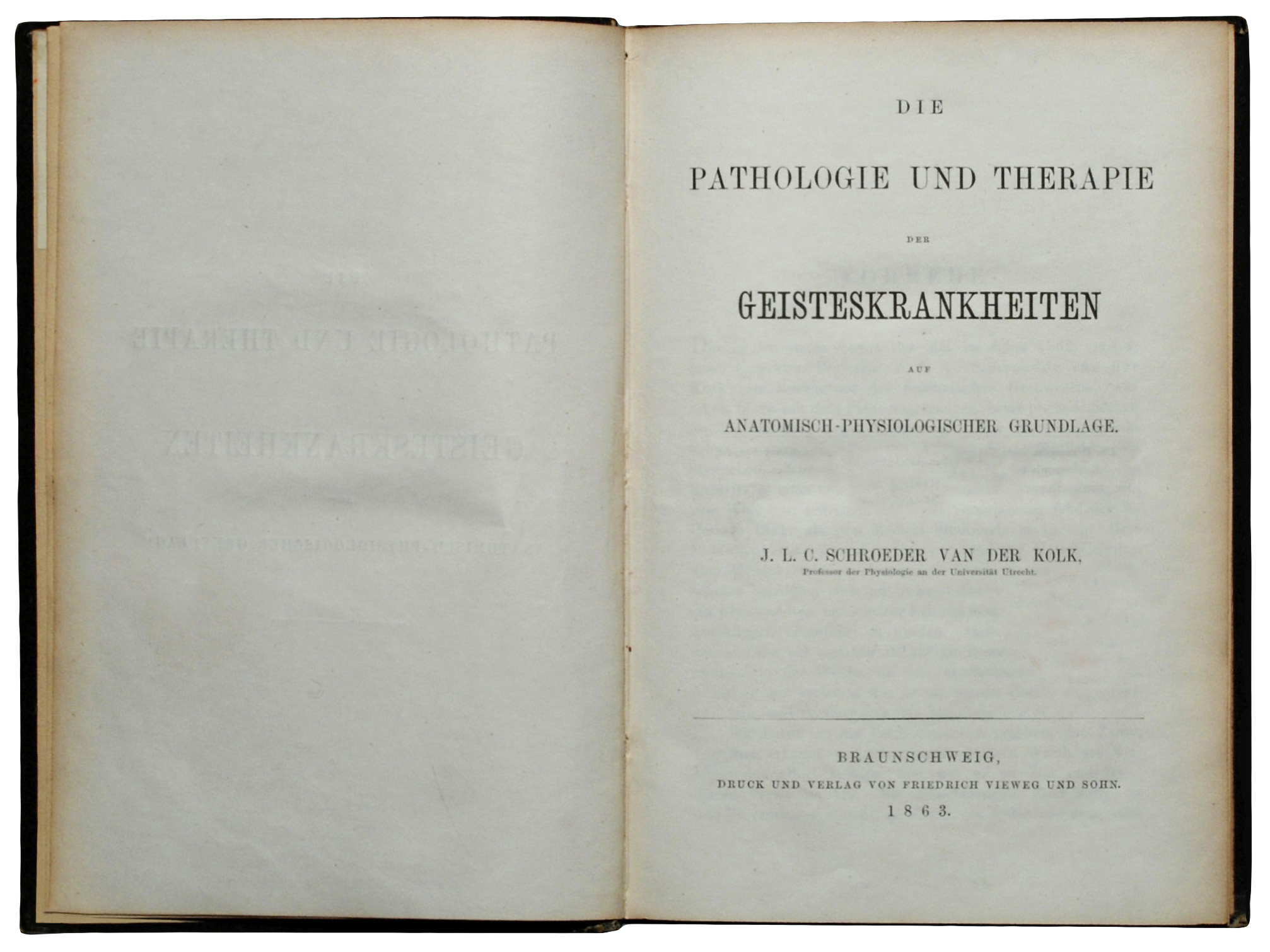 Schroeder van der Kolk, J. L. C.: Die Pathologie und Therapie der Geisteskrankheiten auf anatomisch-physiologischer Grundlage. Übersetzt von Dr. Theile. Braunschweig: F. Vieweg und Sohn 1863, deutsche Erstausgabe.